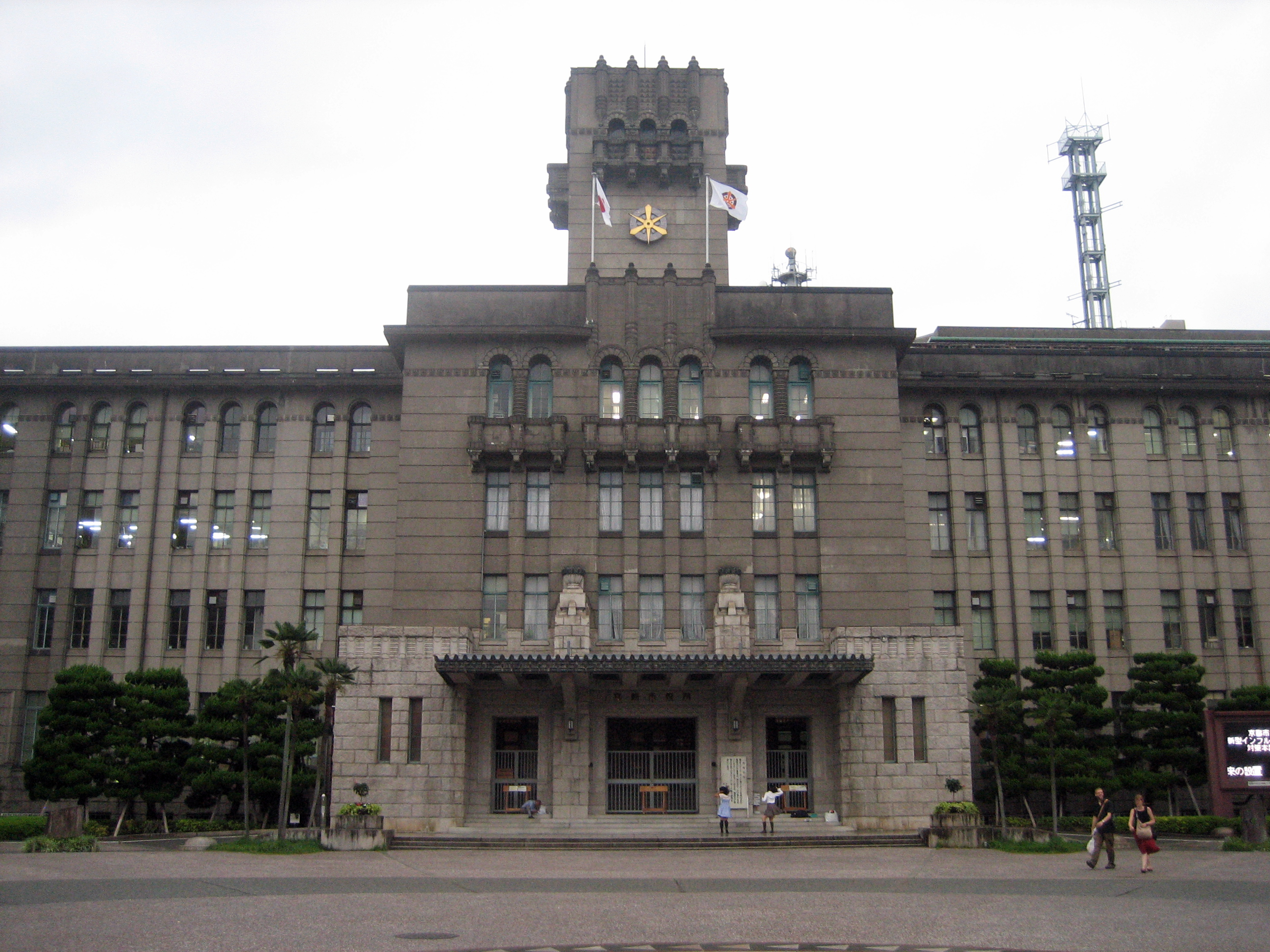 京都市役所。